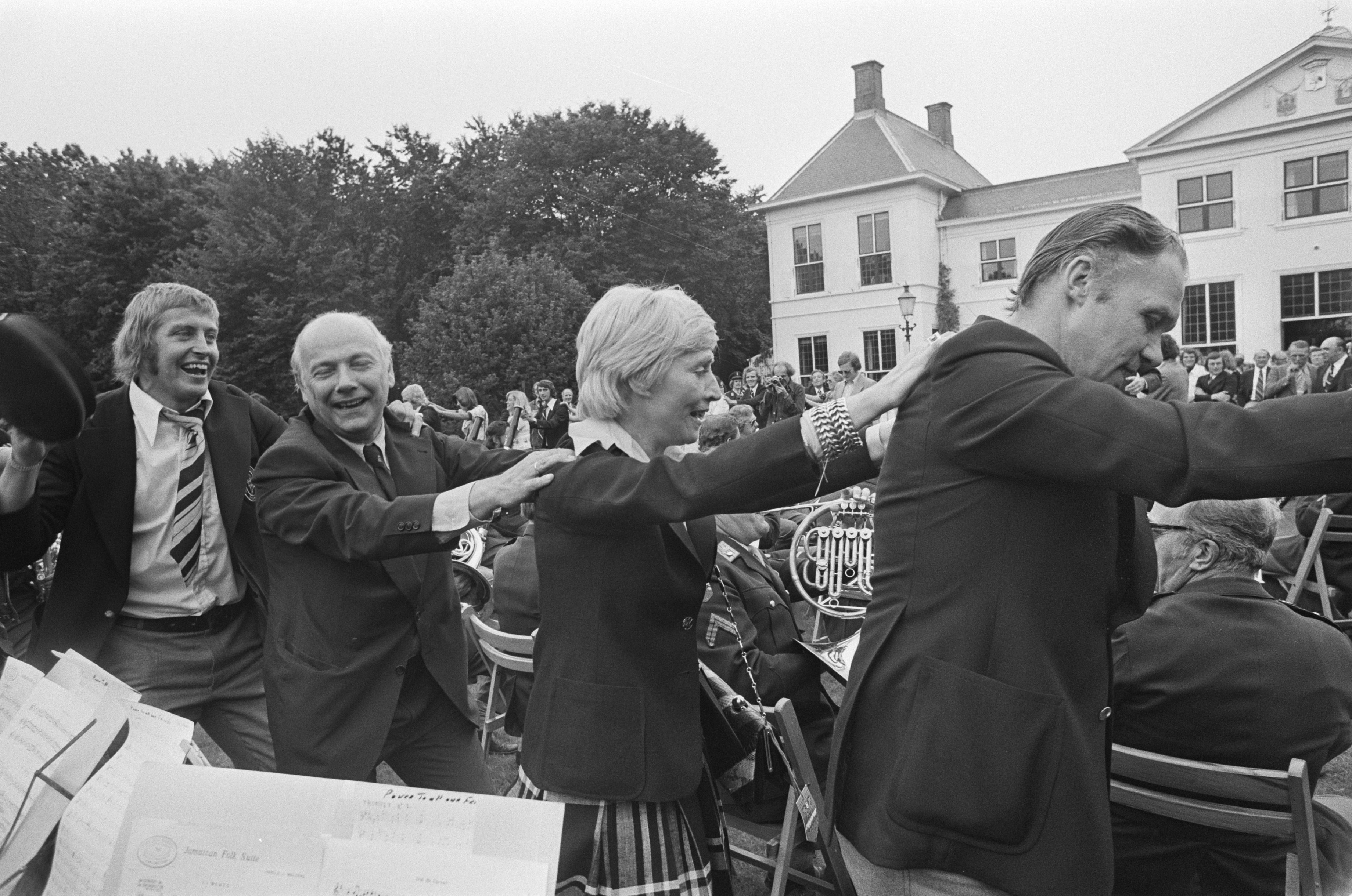 Collectie / Archief : Fotocollectie Anefo Reportage / Serie : [ onbekend ] Beschrijving : Den Uyl ontvangt Nederlands elftal op Catshuis; polonaise in tuin van Catshuis Datum : 8 juli 1974 Trefwoorden : TUINEN, elftallen, ontvangsten, sport, voetballers Persoonsnaam : Uyl, Joop den Fotograaf : Mieremet, Rob / Anefo Auteursrechthebbende : Nationaal Archief Materiaalsoort : Negatief (zwart/wit) Nummer archiefinventaris : bekijk toegang 2.24.01.05 Bestanddeelnummer : 927-3169